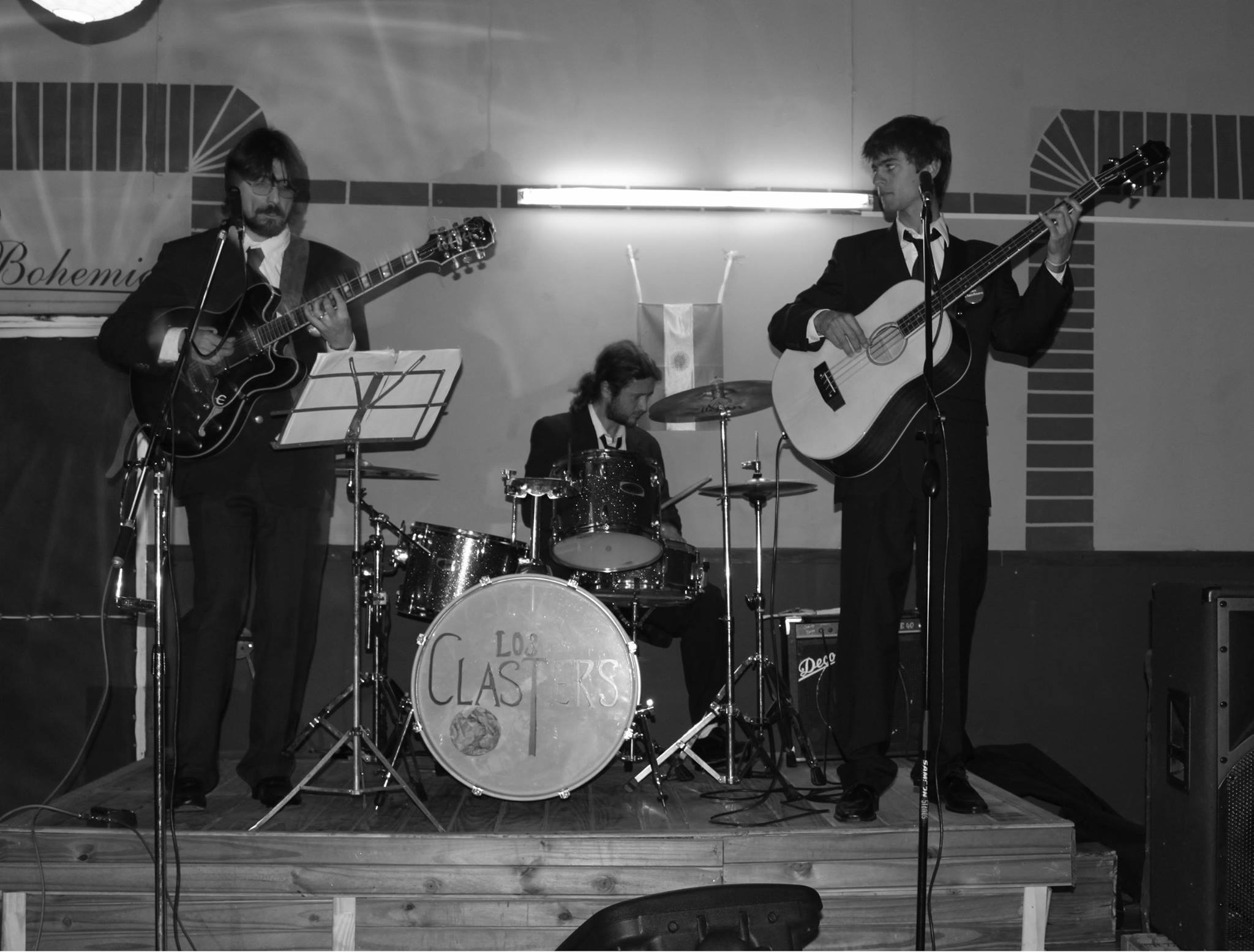 Fotografía en blanco y negro de la banda Los Clasters, con el músico pergaminense Pablo Read (n. 1977), Ramiro Berahgen y Martín Buzzano.